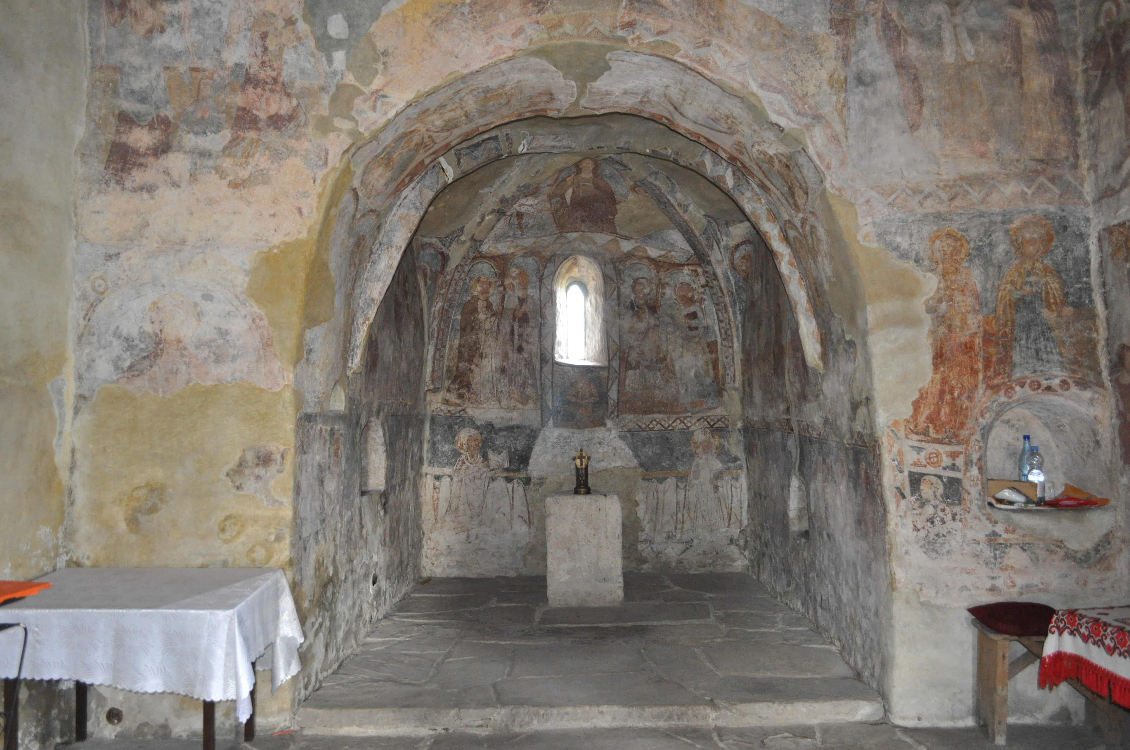 Biserica „Adormirea Maicii Domnului”, sat aparținător Strei; oraș Călan